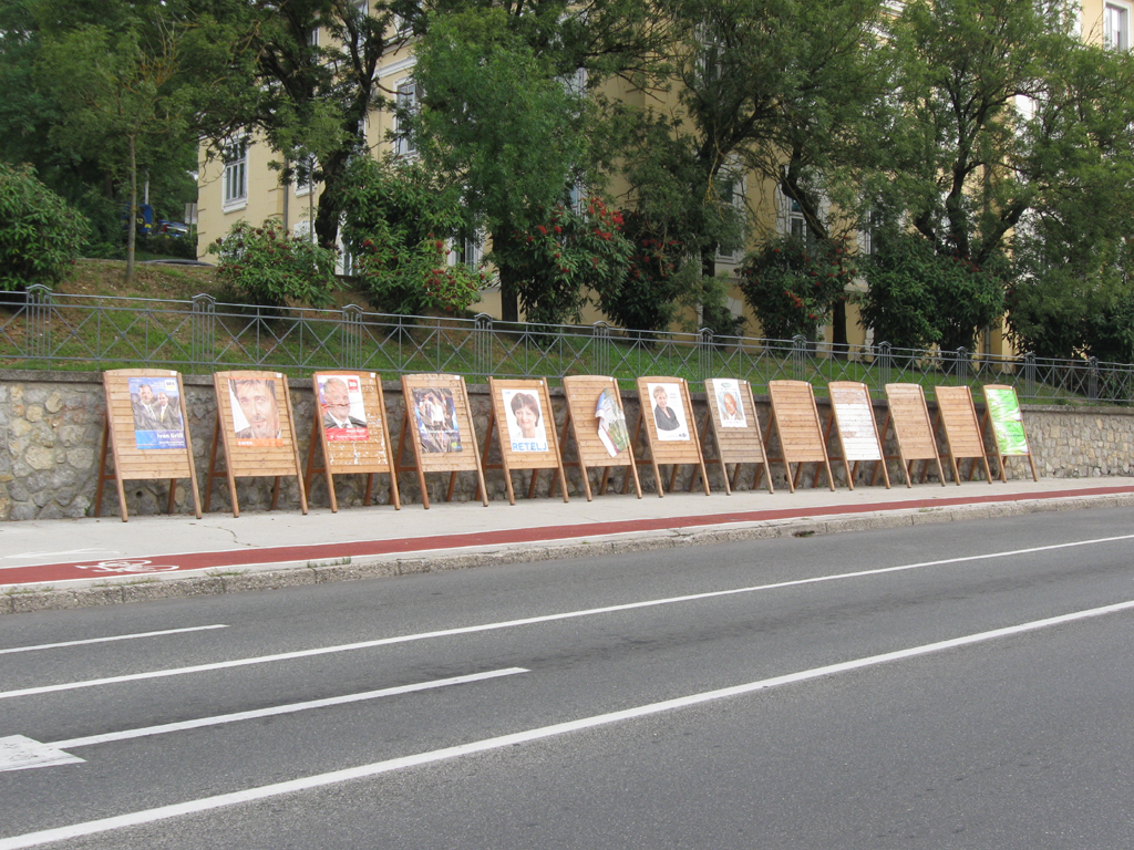 Volilni_plakati Državnozborske volitve v Sloveniji 2008